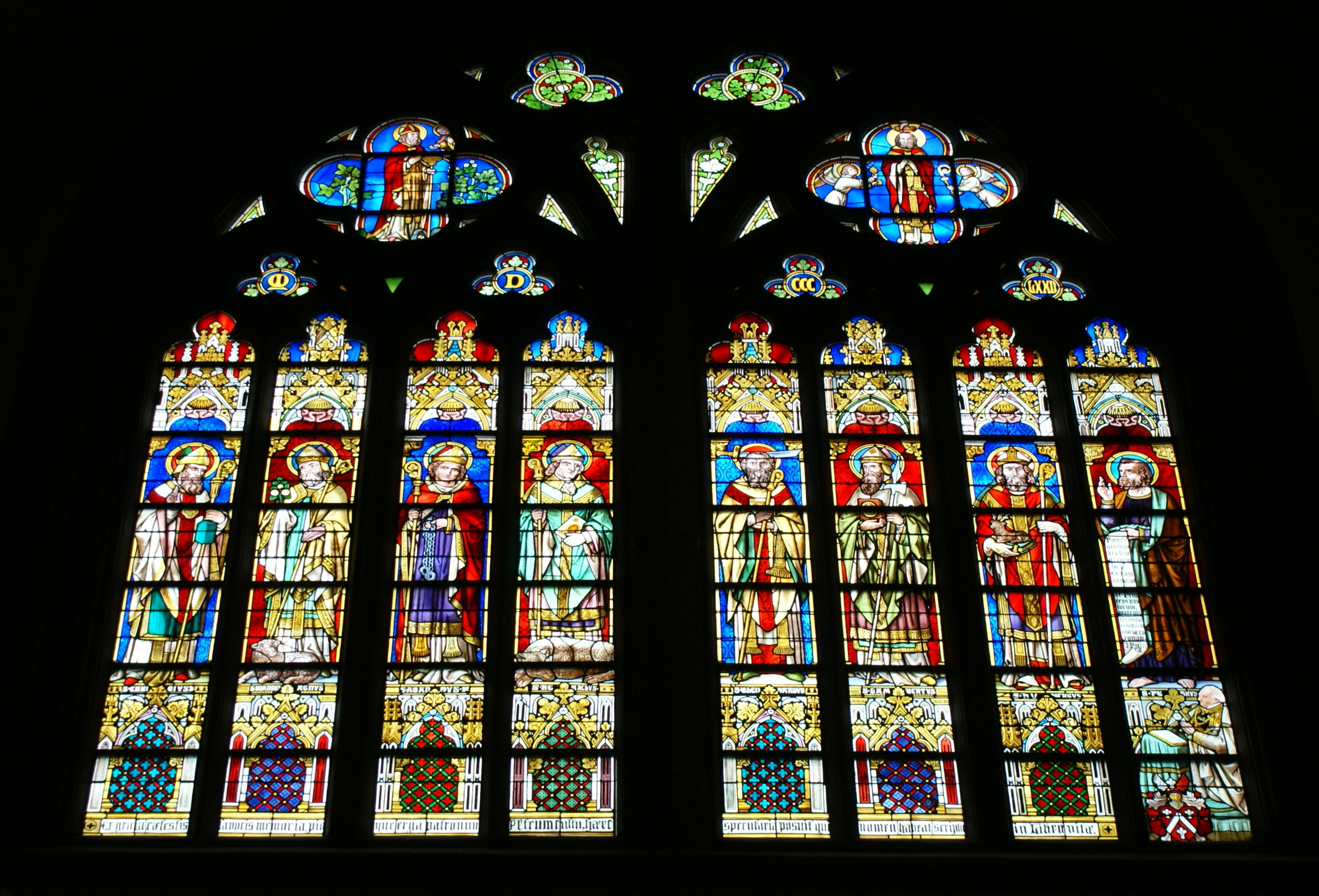 De ramen in de noordwand van het linker transept tonen voorstellingen van zeven Maastrichtse bisschoppen, St. Petrus en twee scènes uit het leven van Servaas, het slaan van de bron en zijn kroning in de hemel (geschenk van Petrus Regout in 1872)